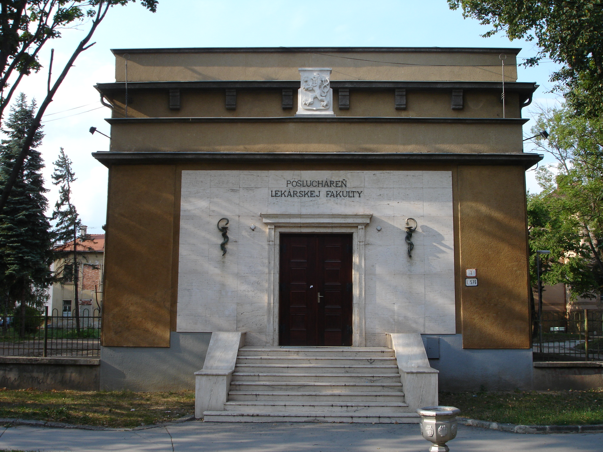 Poslucháreň Lekárskej fakulty Univerzity Pavla Jozef Šafárika v Košiciach